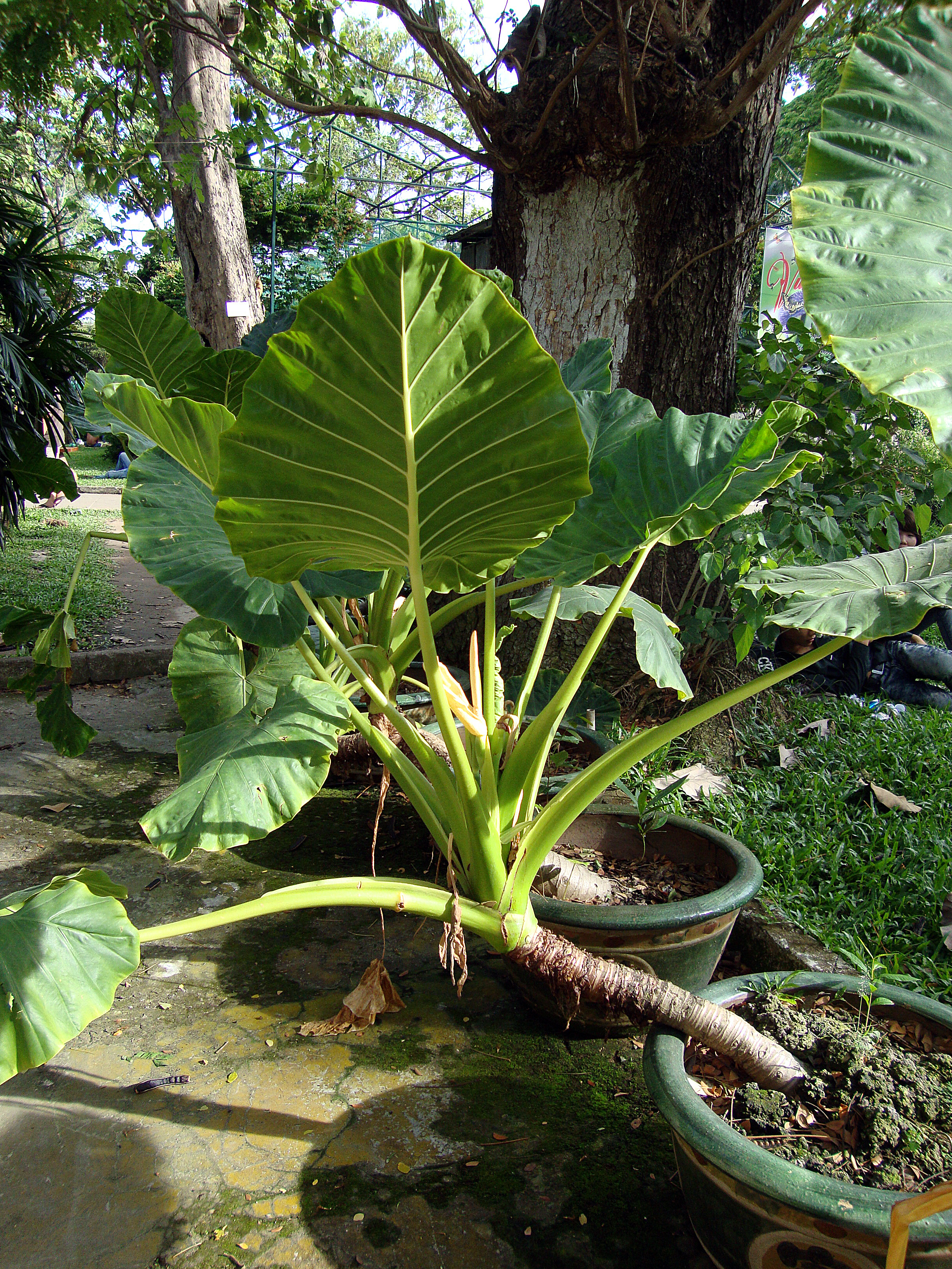 Alocasia macrorrhizos (L.) G.Don, 1839